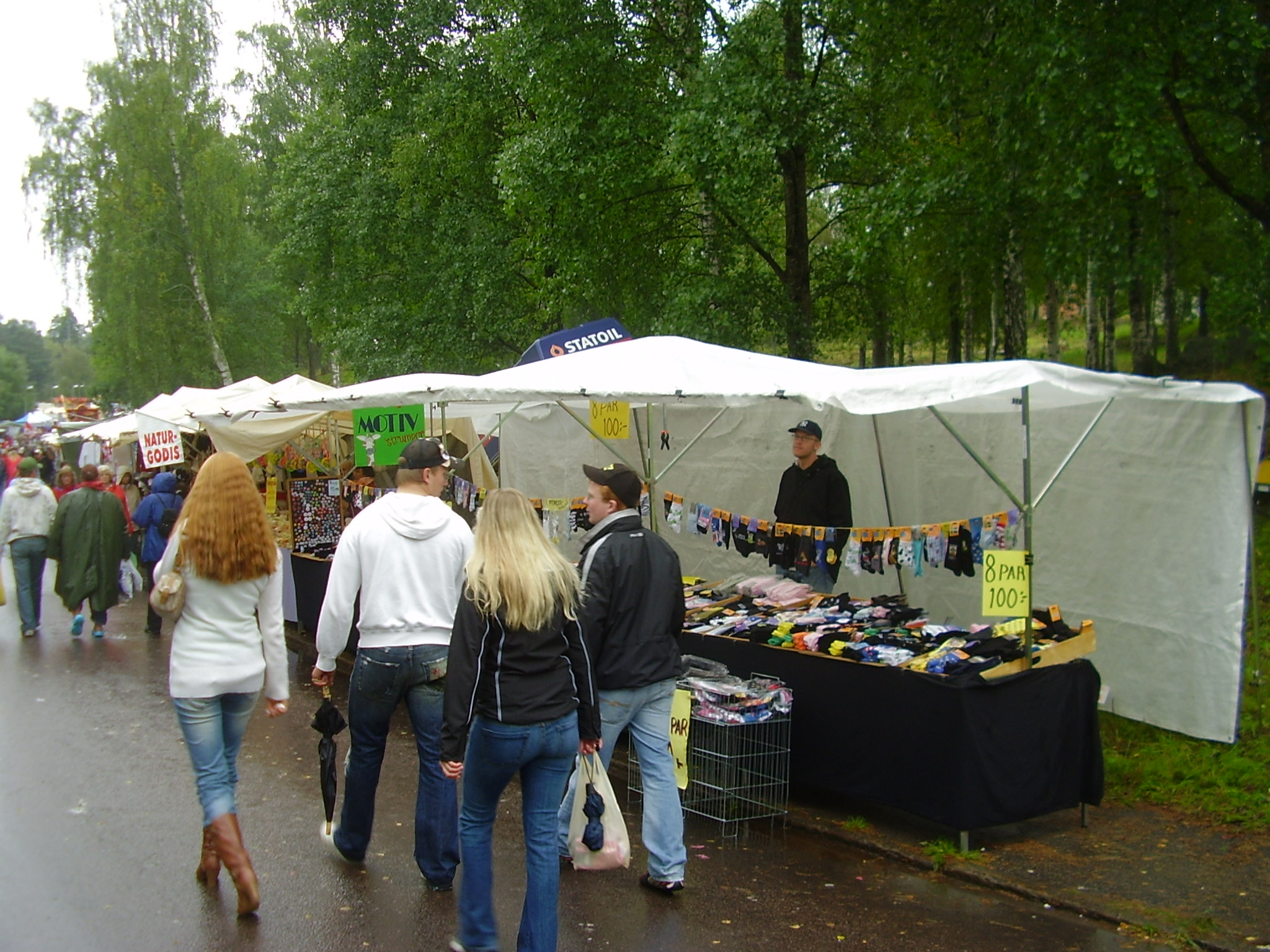 Knallar på Oxhälja marknad i Filipstad